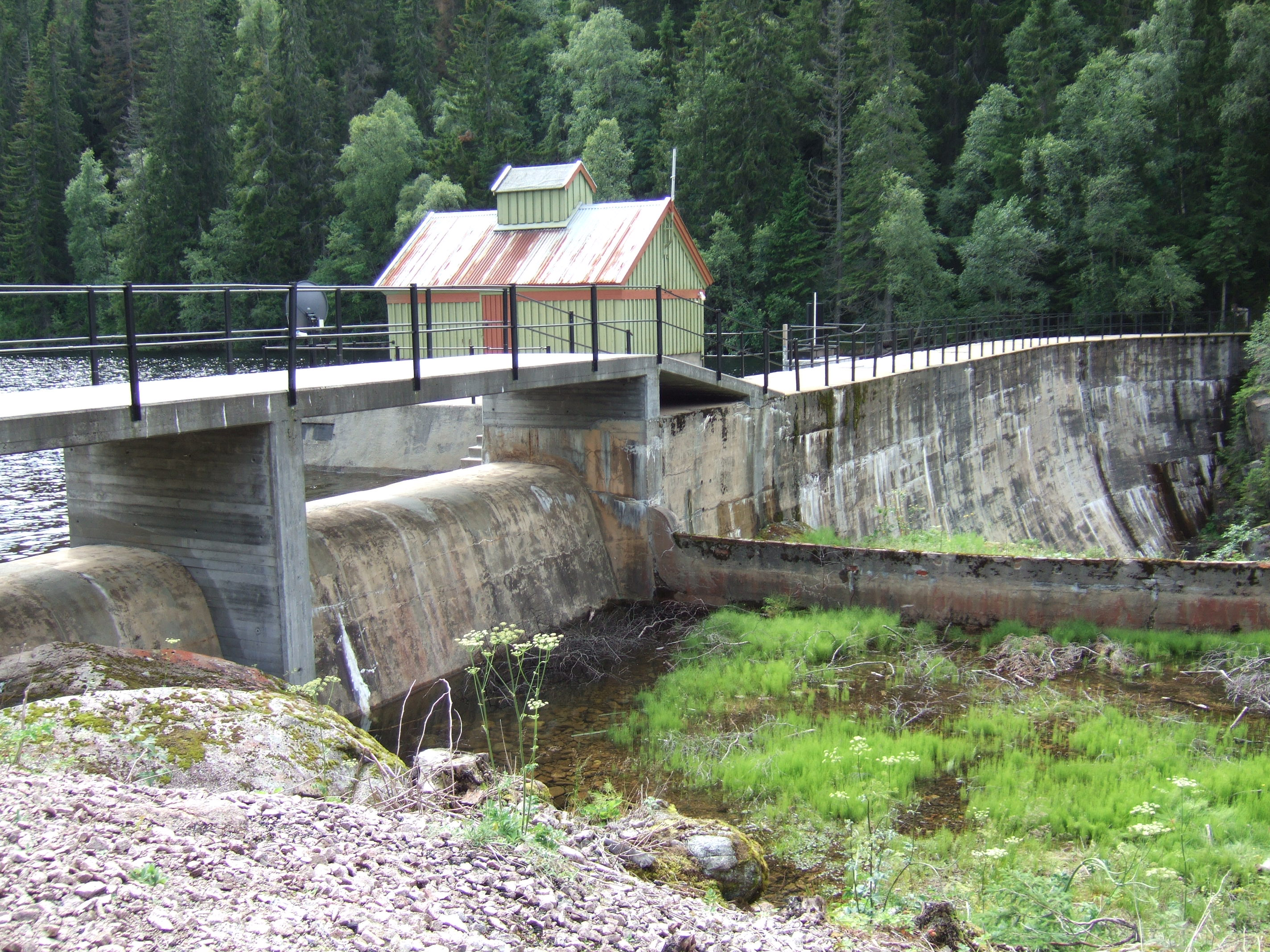 Øksnevann dam for Hakavik hydroelectric power plant in Øvre Eiker.